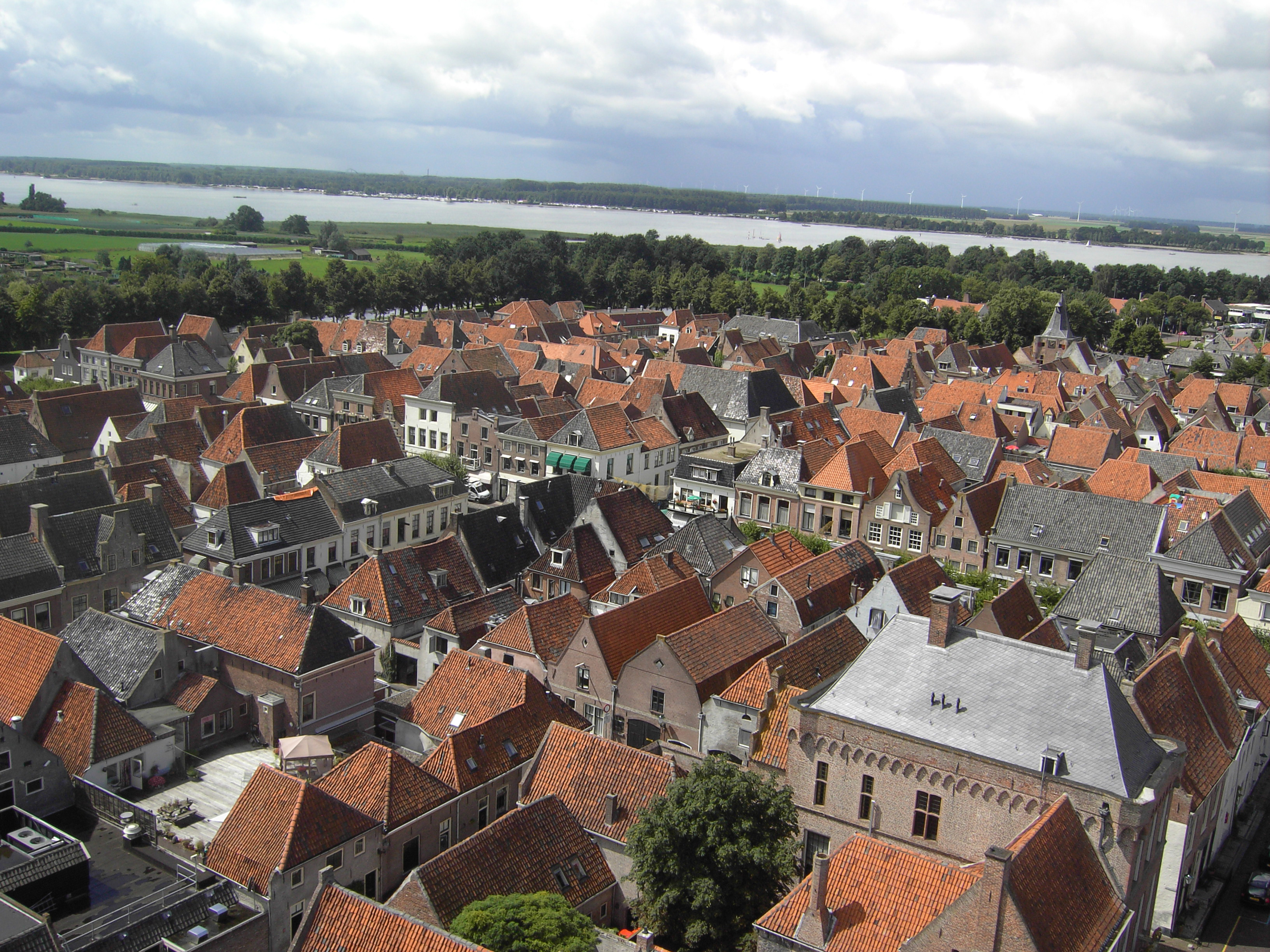 Elburg - Gelderland - Nederland - Zicht vanop kerktoren. Boven het Veluwemeer. Rechts de toren van de Vischpoort.